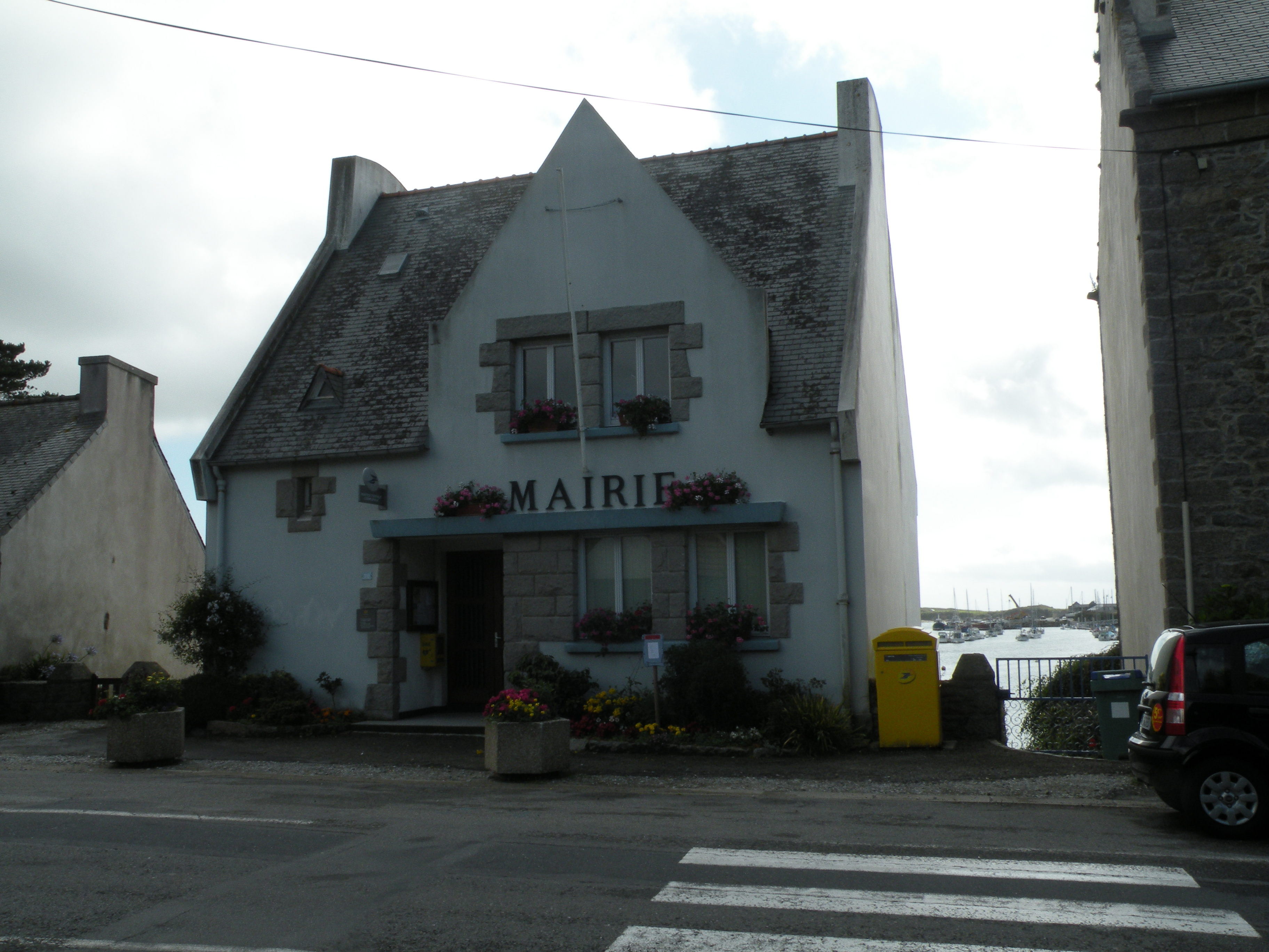 Ti-kêr Lannildud.